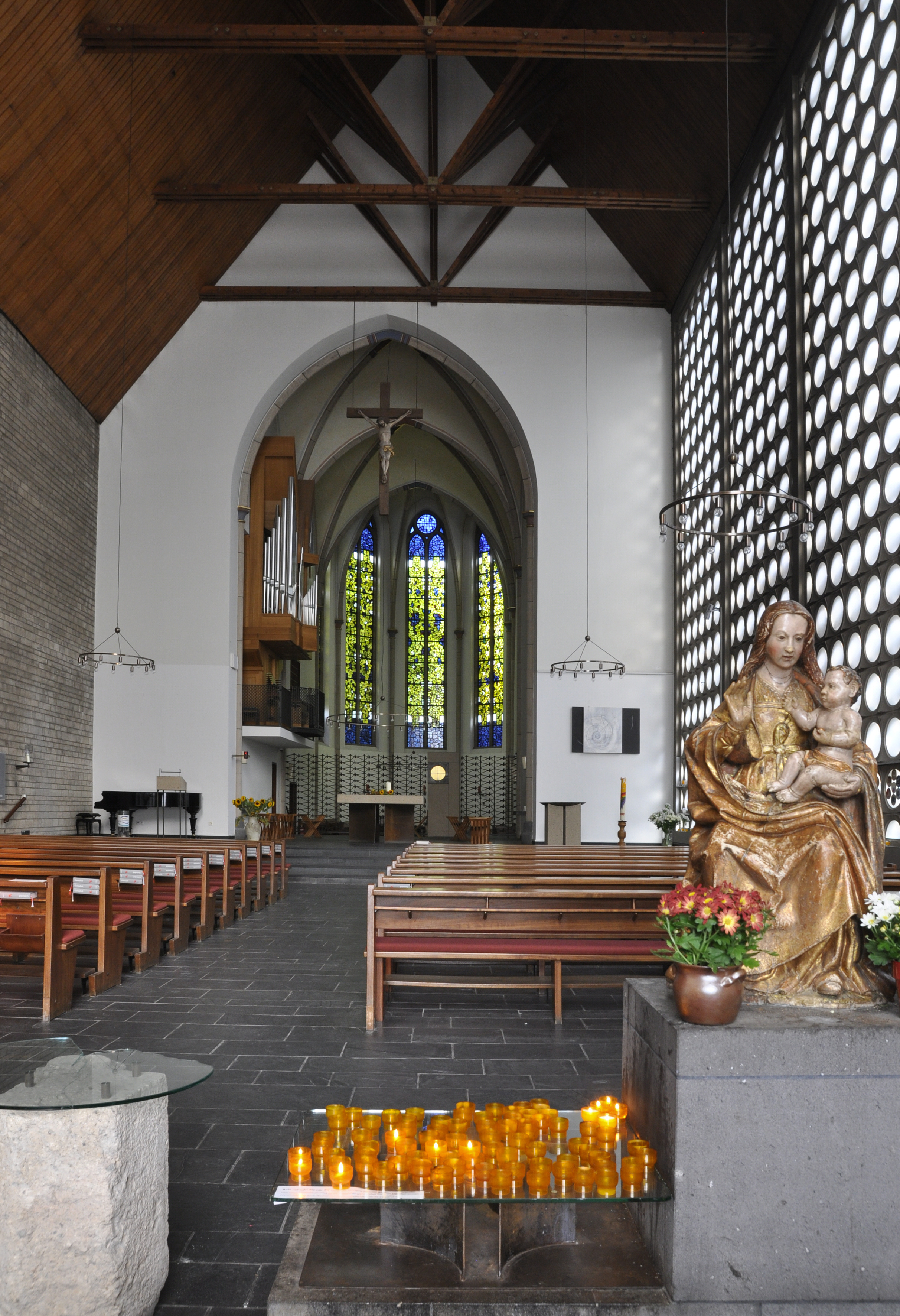 Kirchenschiff (1959-62) nach Osten mit Chor (Ende 13. Jahrh.) und der Madonnenfigur "Mutter vom guten Rat" (16. Jahrh.)This is a photograph of an architectural monument., no. 338